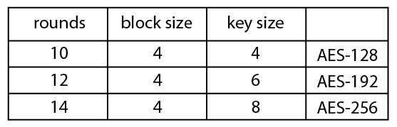 AES table